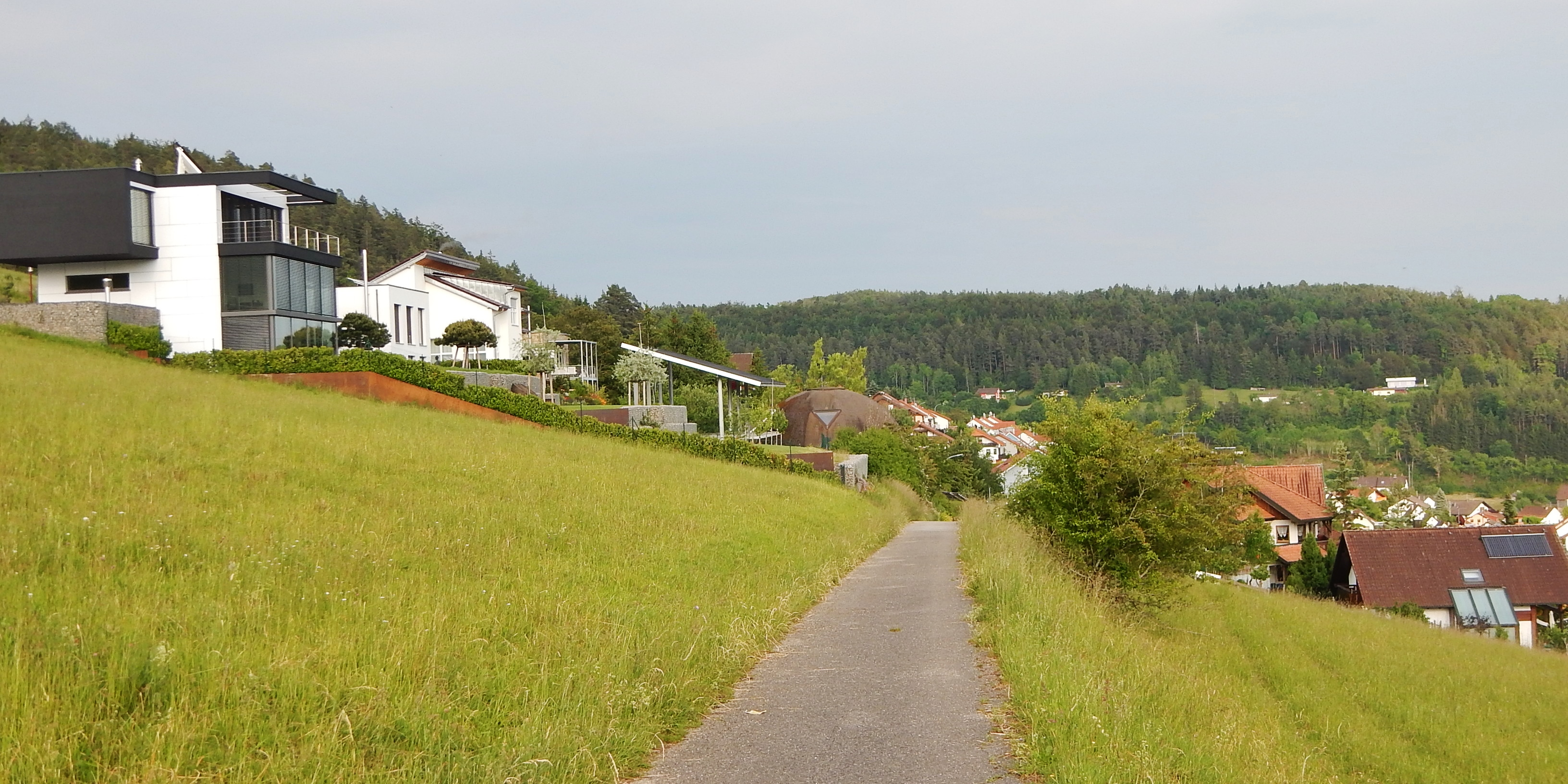 Haiterbach